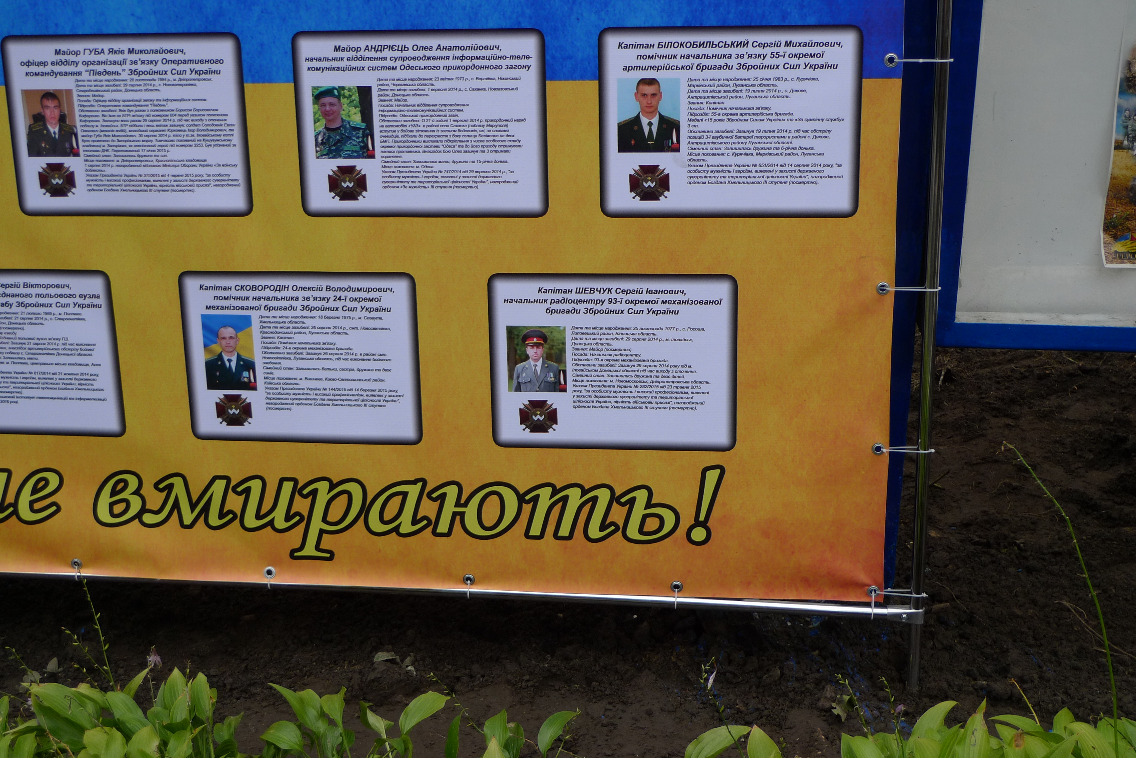 Фрагмент пам'ятної дошки зі згадкою випускників Київського військового інституту управління та зв'язку, які загинули під час оборони України від російської агресії на Донбасі